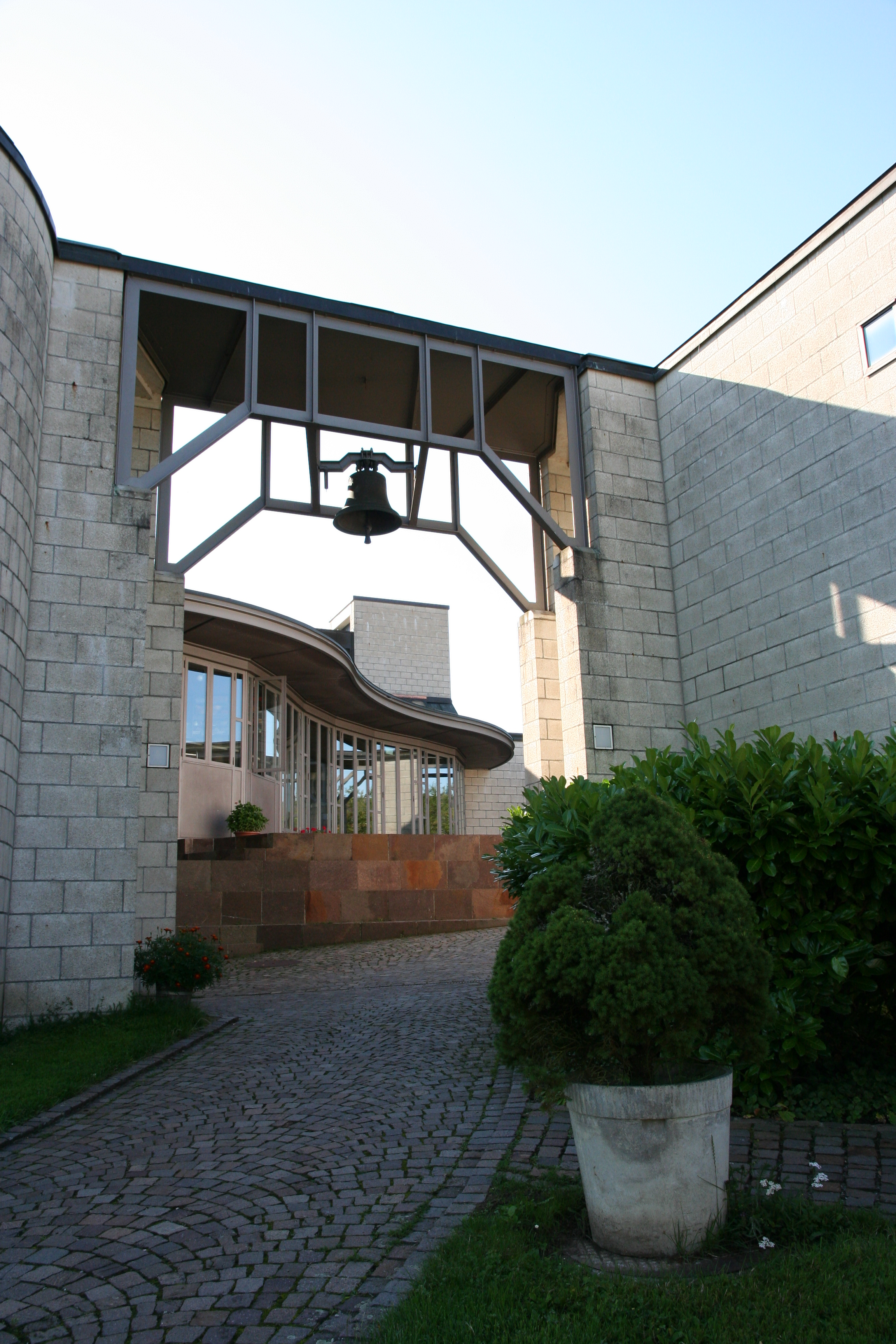 Römisch-katholische Pfarrkirche St. Josef Affoltern am Albis, Zugang von Westen mit alter Glocke